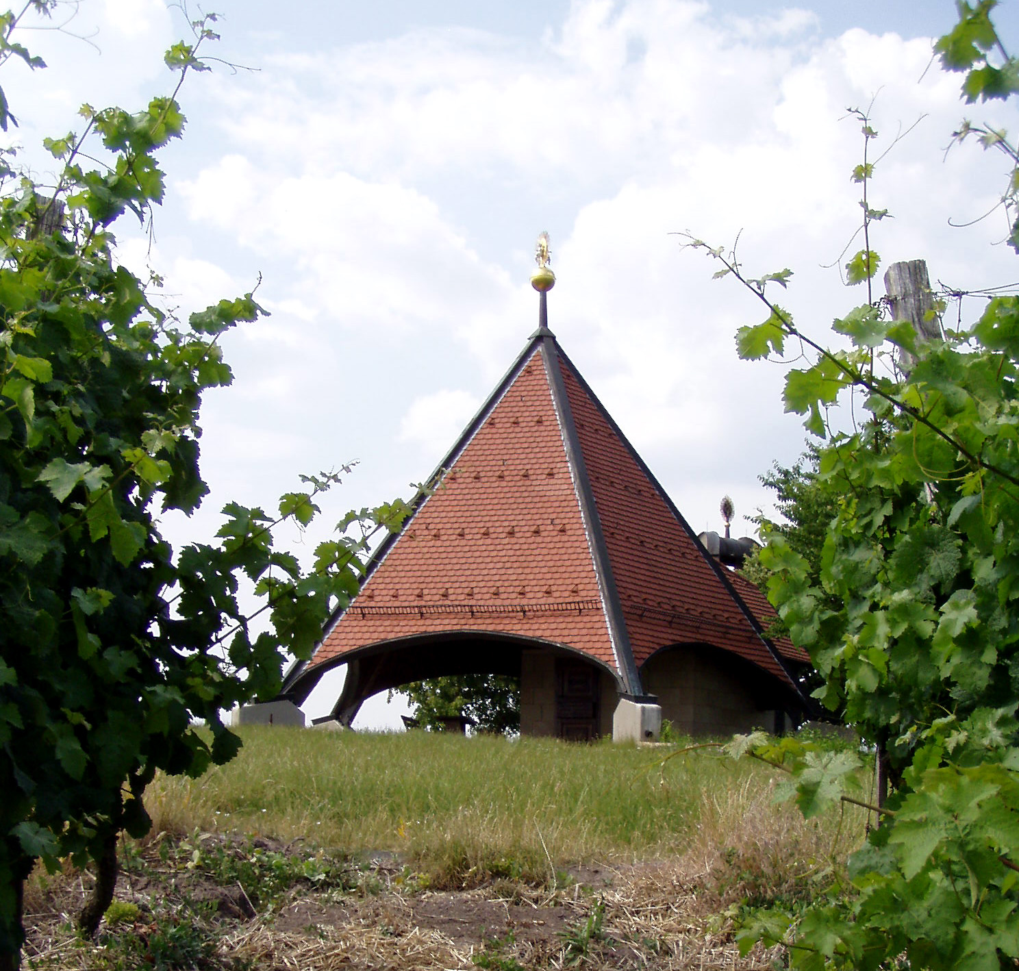 Weinbergskapelle 14 Nothelfer bei dem unterfränkischen Weinort Oberschwarzach